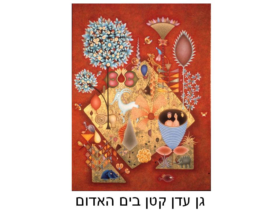 גן עדן קטן בים האדום